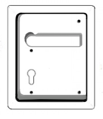 Muscheltürdrücker